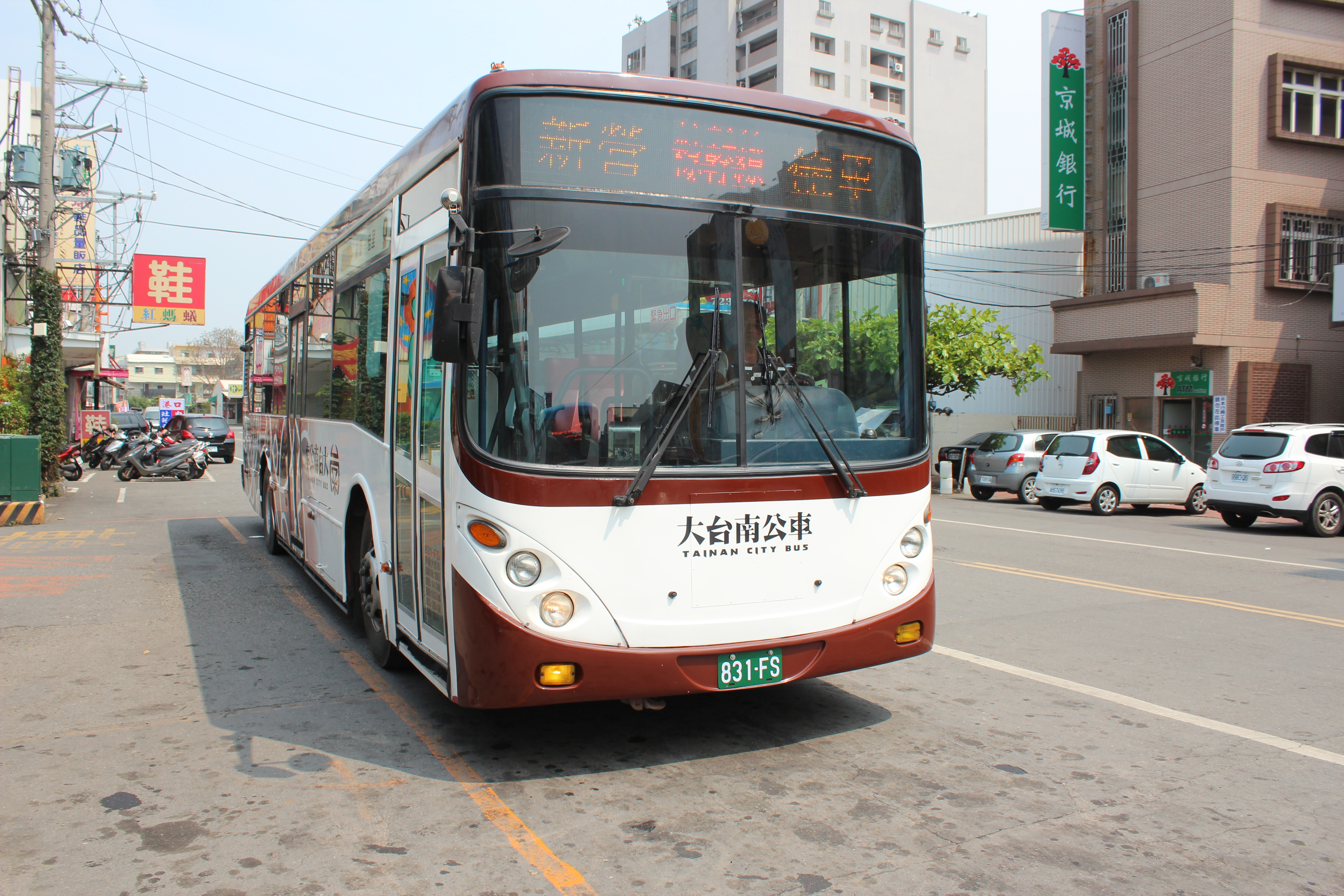 中文（台灣）: 新營客運2004年原臺北客運日野ERK2JRL大客車831-FS。